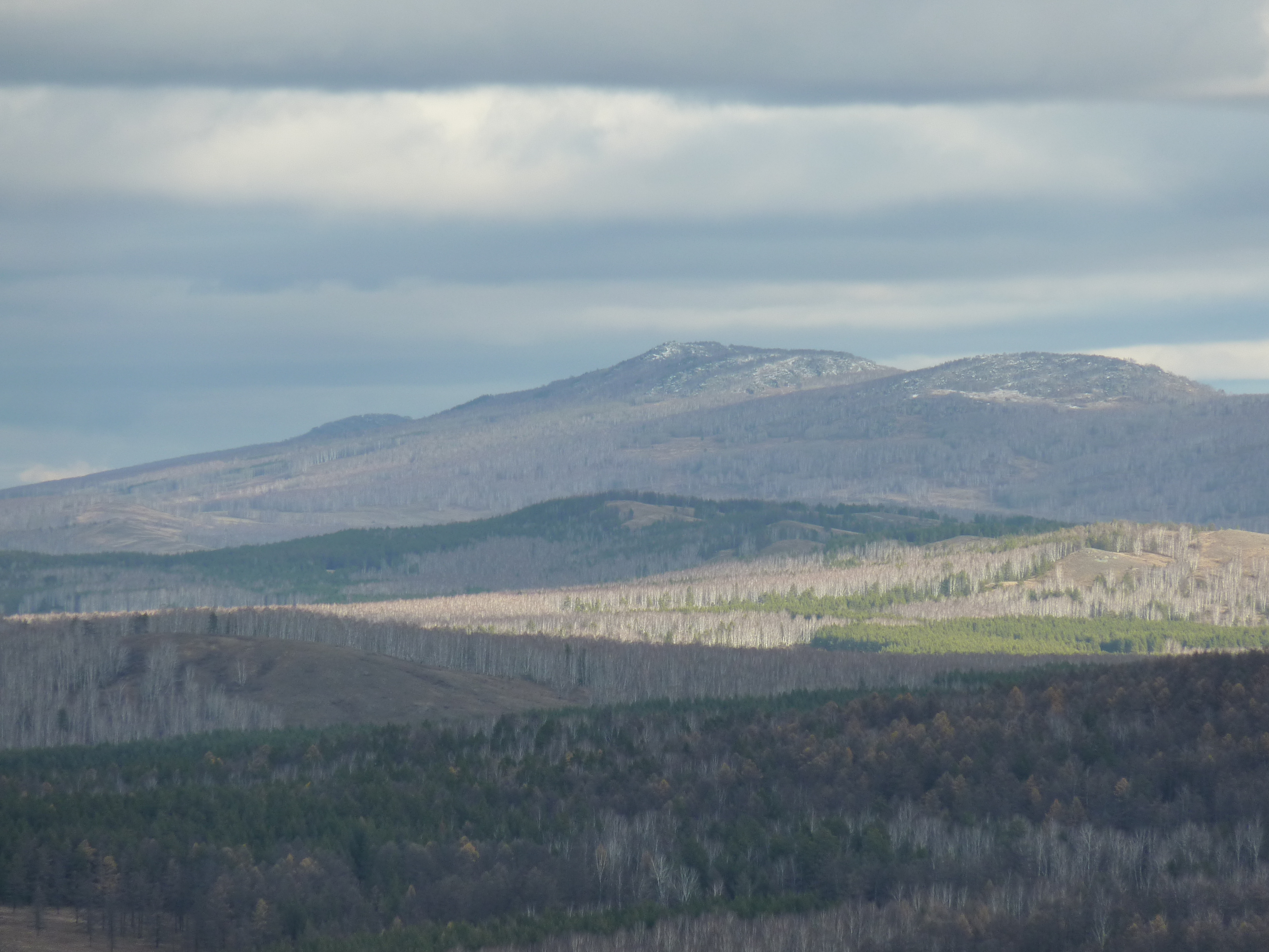 Вид на хребет Ирендык